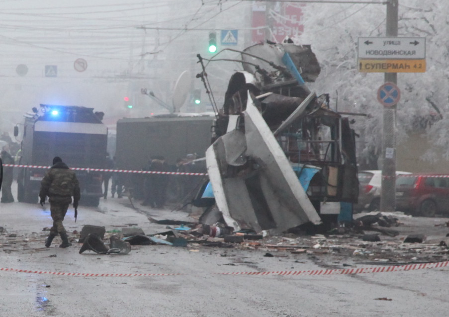 Развороченный троллейбус после теракта в Волгограде